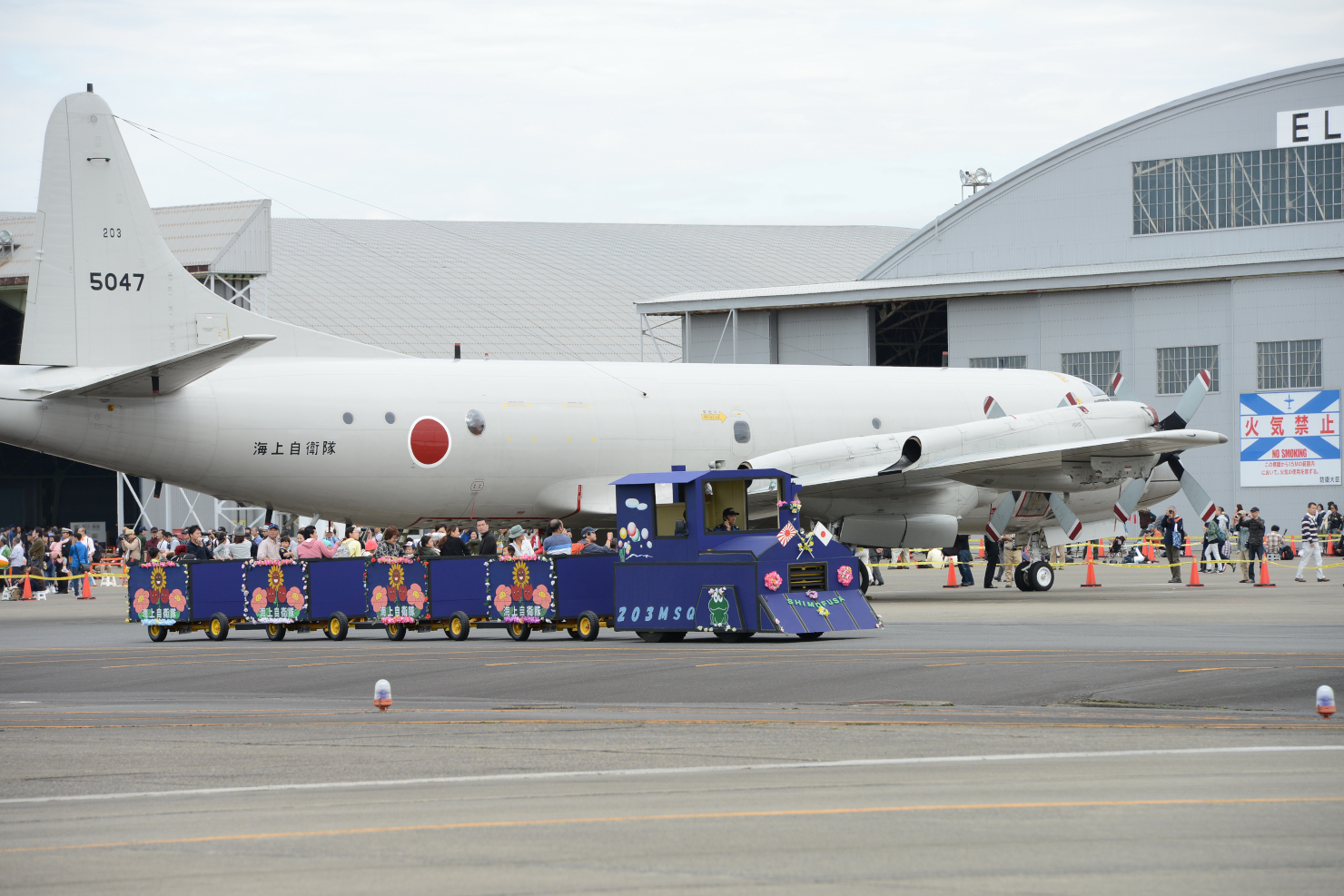 平成２８年１０月２９日（土）に「海上自衛隊 下総航空基地 開設５７周年記念行事」を開催しました。 当日は記念式典、観閲行進、P-3C体験搭乗、花電車、ミニP-3C公演、横須賀音楽隊、高野太鼓等各種イベントを実施しました。来年も皆様のご来場を隊員一同心よりお待ちしております。